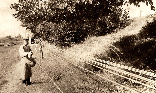 Ropewalk